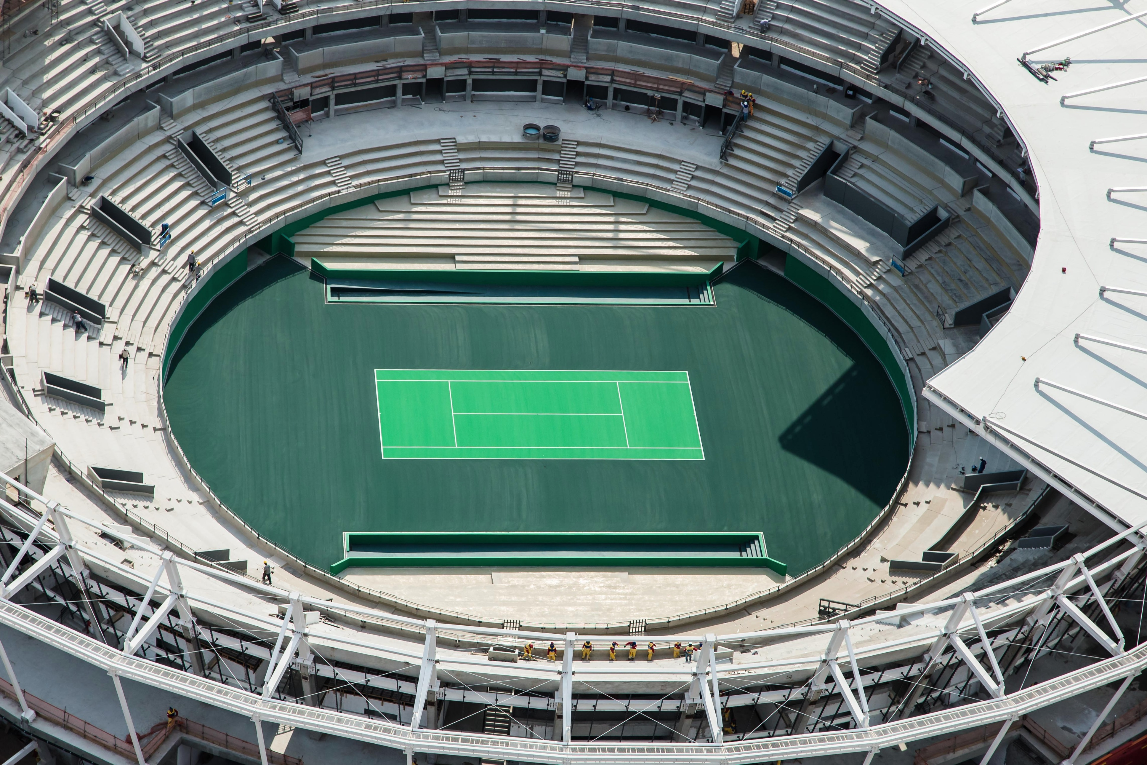 Centro Olímpico de Tenis - Octubre 2015. Foto: Renato Sette Camara / Alcaldía de Río de Janeiro